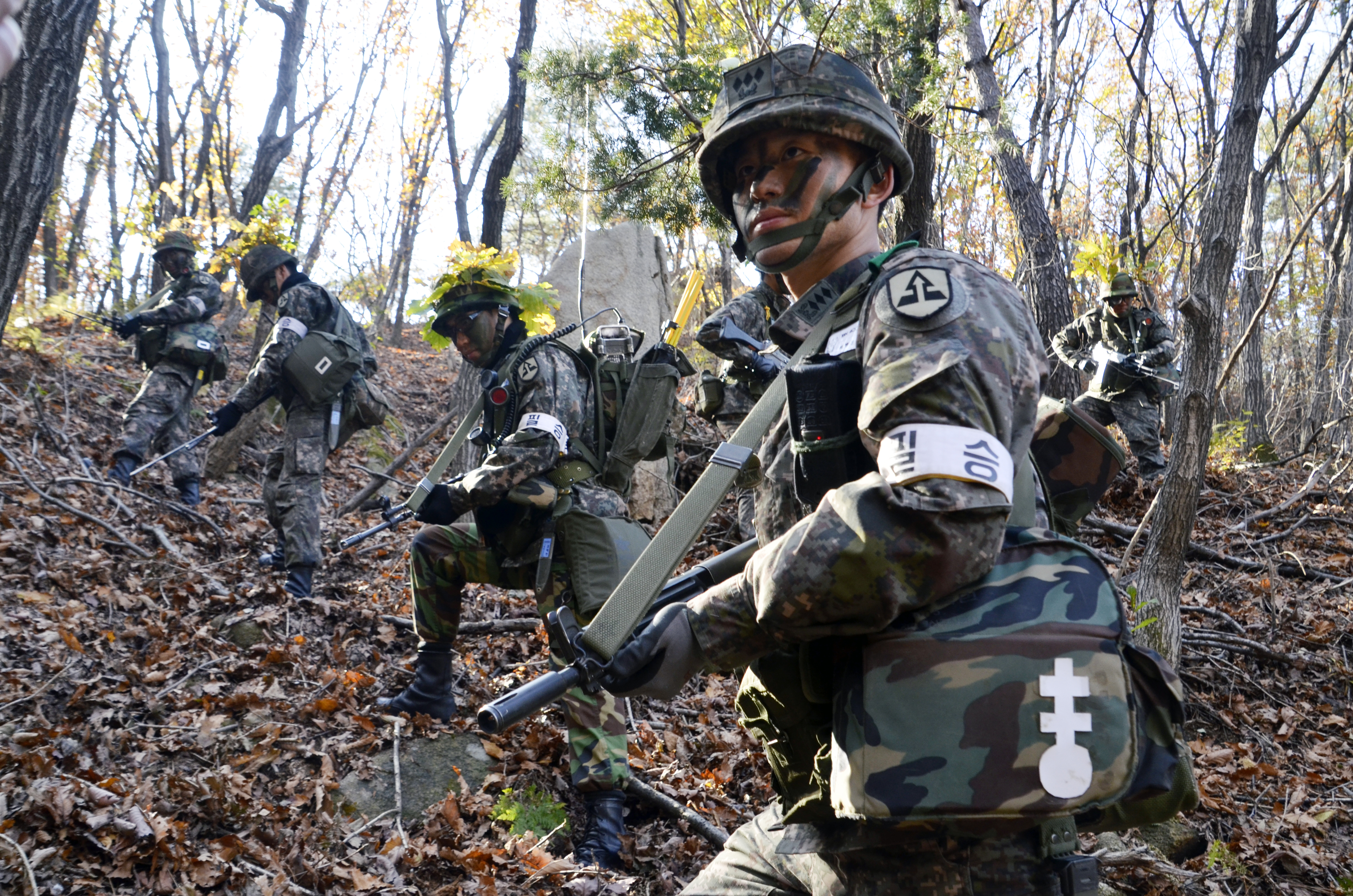 촬영 : 52사단 중사 김대용